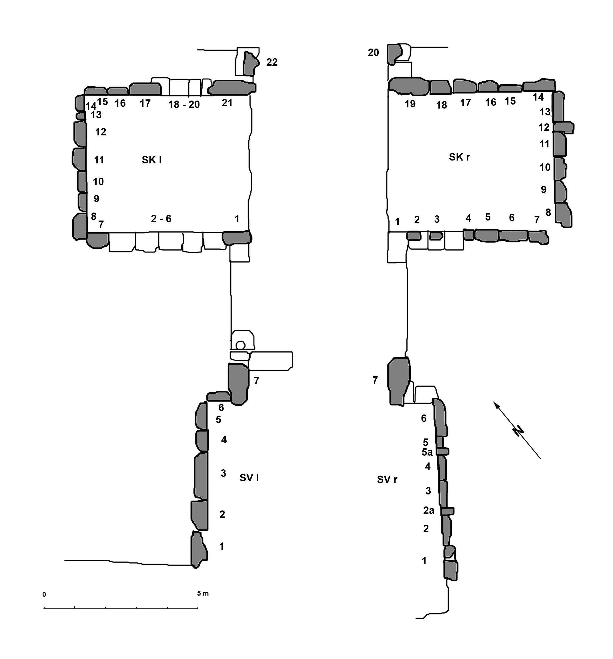 Karatepe-Arslantaş, Südtor, Zeichnung der Lage der Reliefs